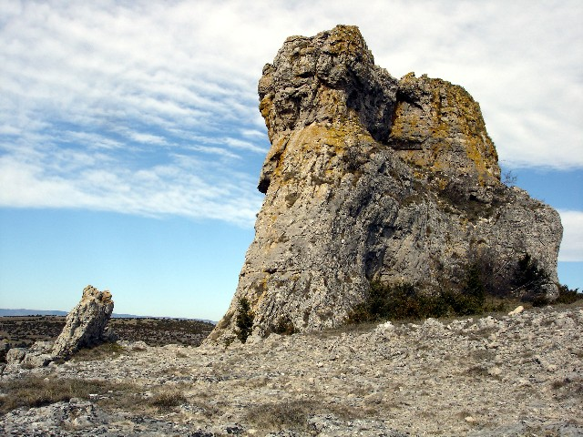 Roche dolomitique du Larzac